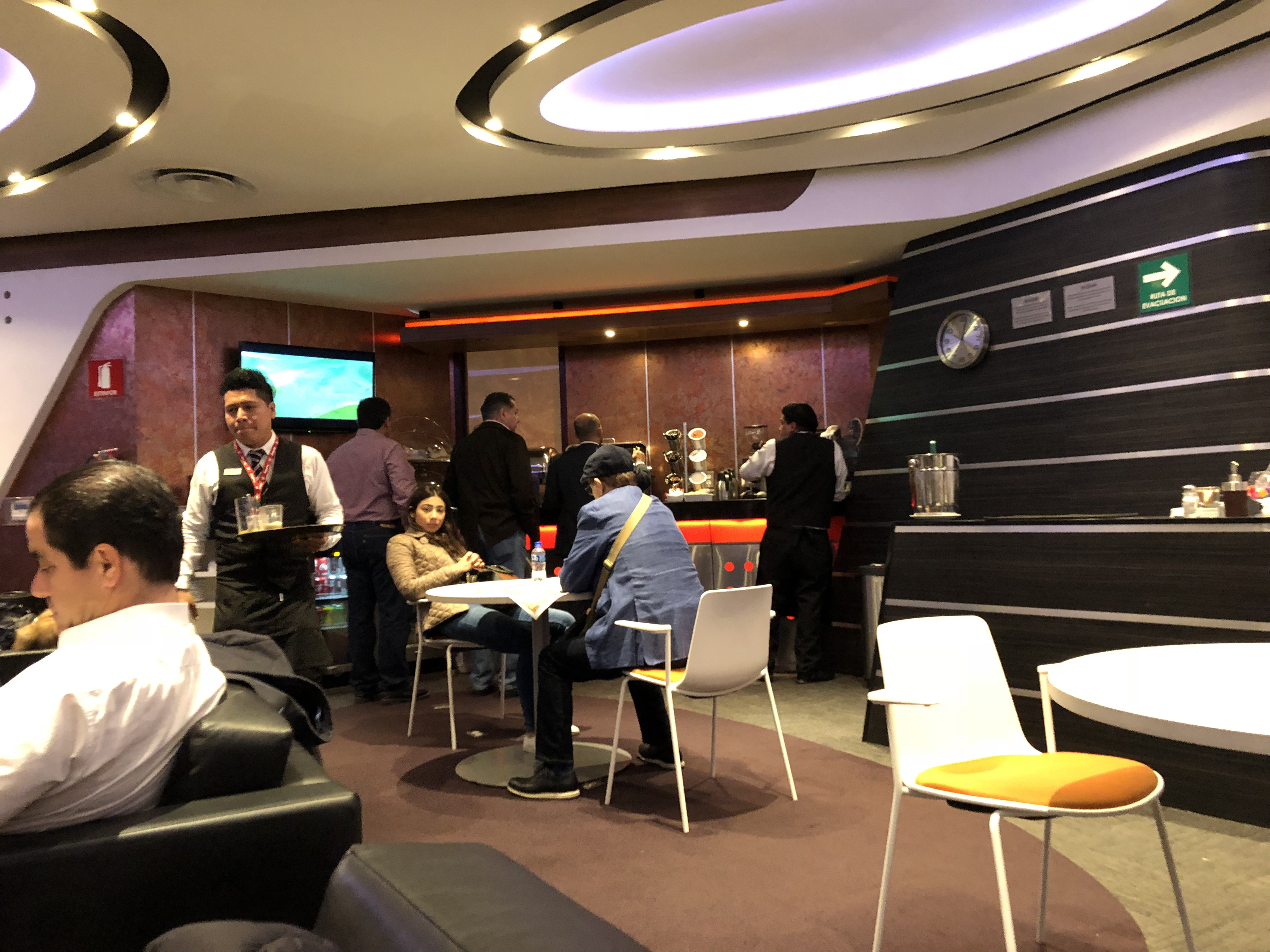 VIP Lounge (este) en el Aeropuerto Internacional de Guadalajara.